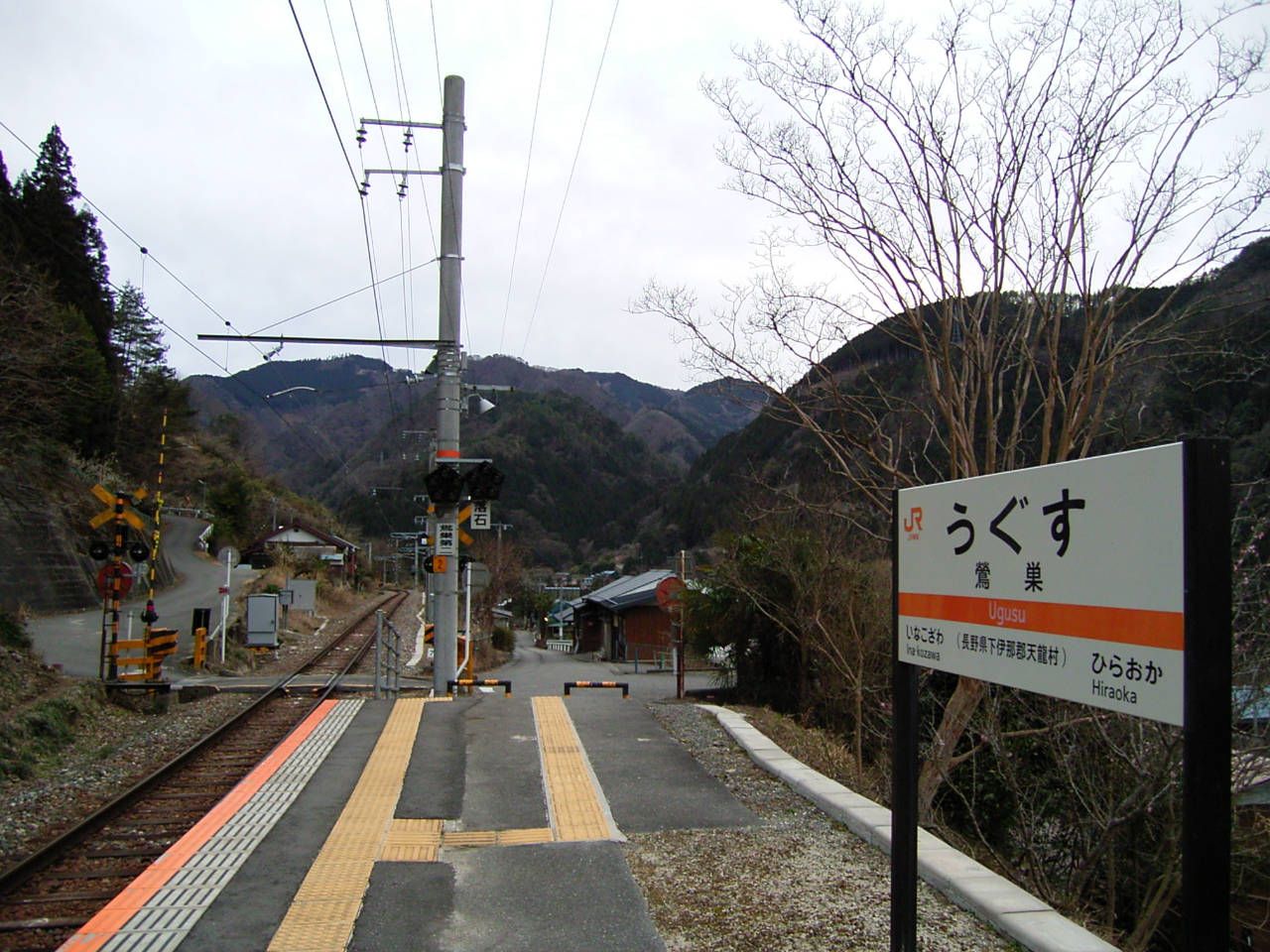 飯田線鶯巣駅